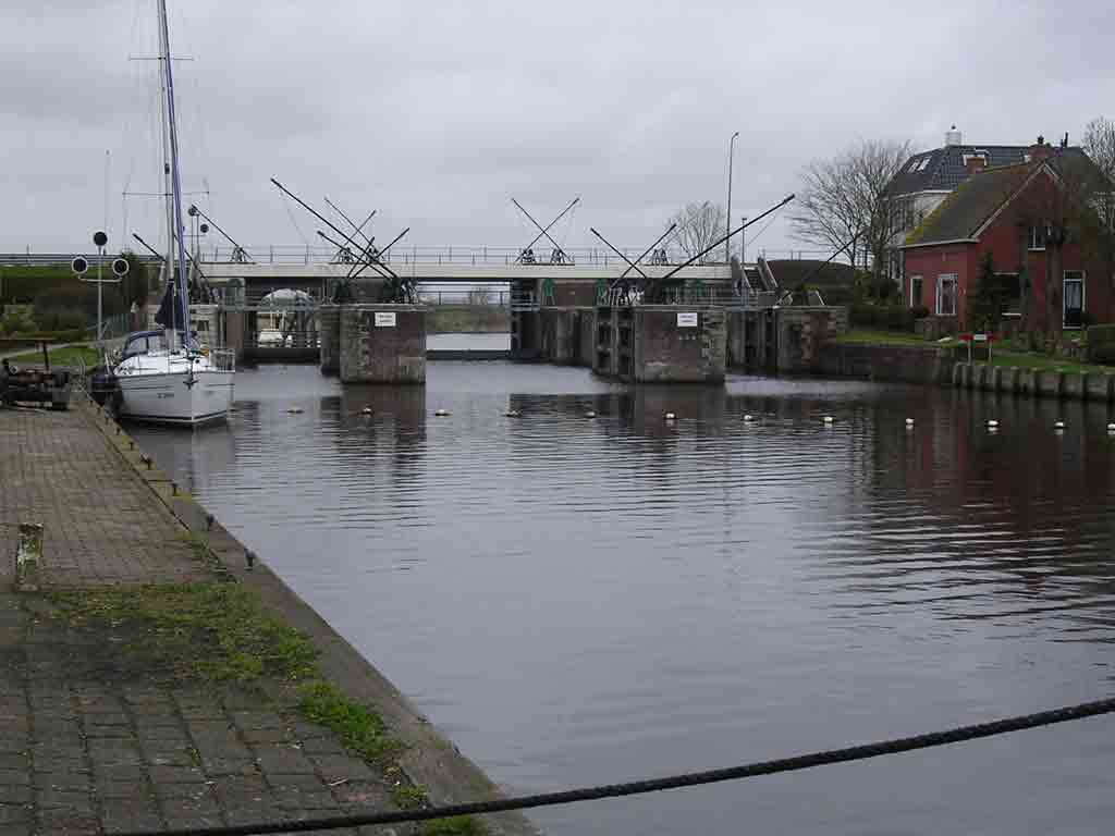 Sluis Dokkumer Nieuwe Zijlen